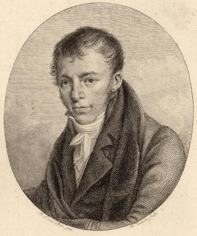 Caspar Georg Carl Reinwardt (1773-1854)